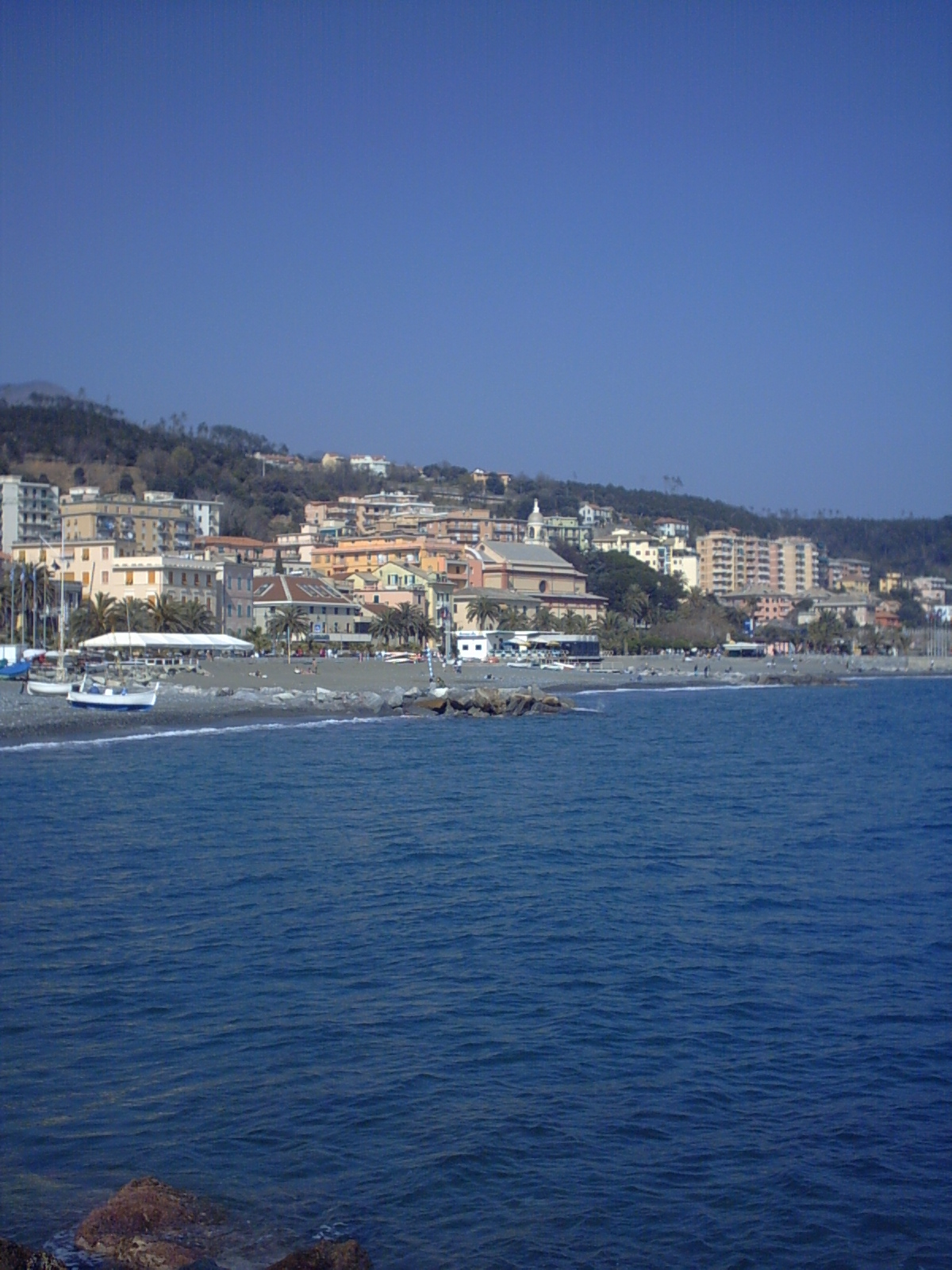 Cogoleto vista dal mare